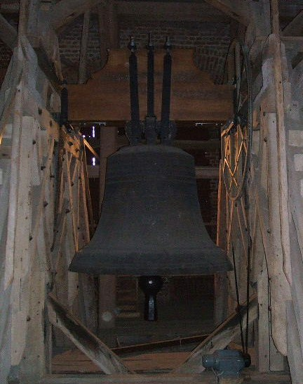 Stralsund, Marienkirche: Dreifaltigkeitsglocke (as0) von 1663